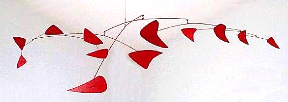 Red Mobile, di Alexander Calder. 1956. Lamiera verniciata e bacchette di metallo. Montreal Museum of Fine Arts. Foto di Montrealais.